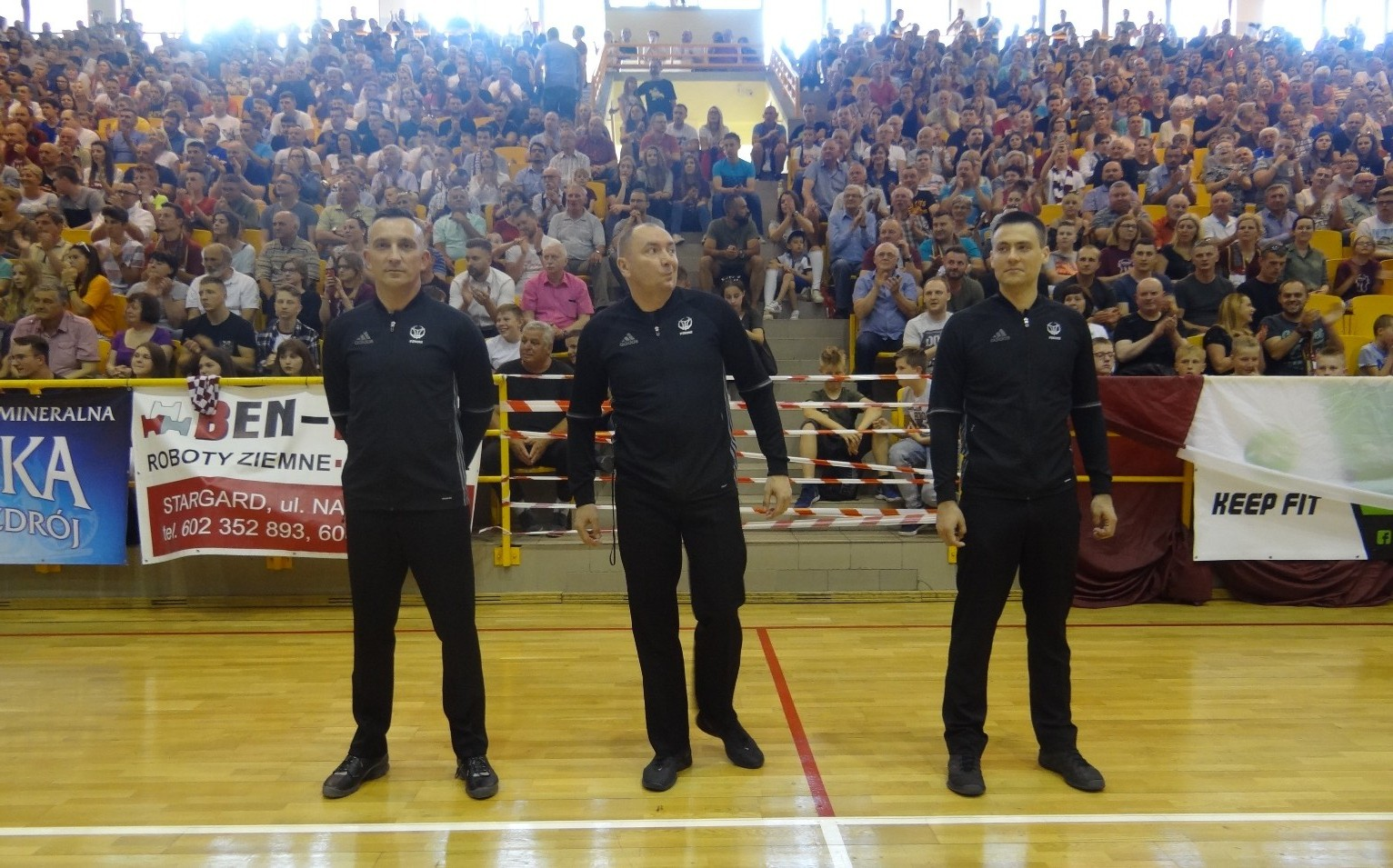 Sędziowie meczu Spójnia Sokół Łańcut, 12.05.2018